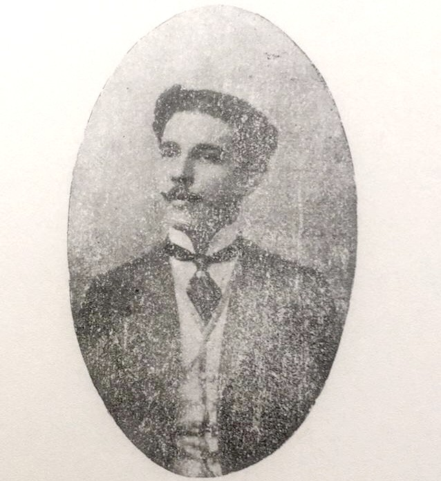 Sergio Medina (La Victoria, 7 de octubre de 1882 - Ib., 7 de abril de 1933), fue un poeta, periodista y agricultor venezolano.